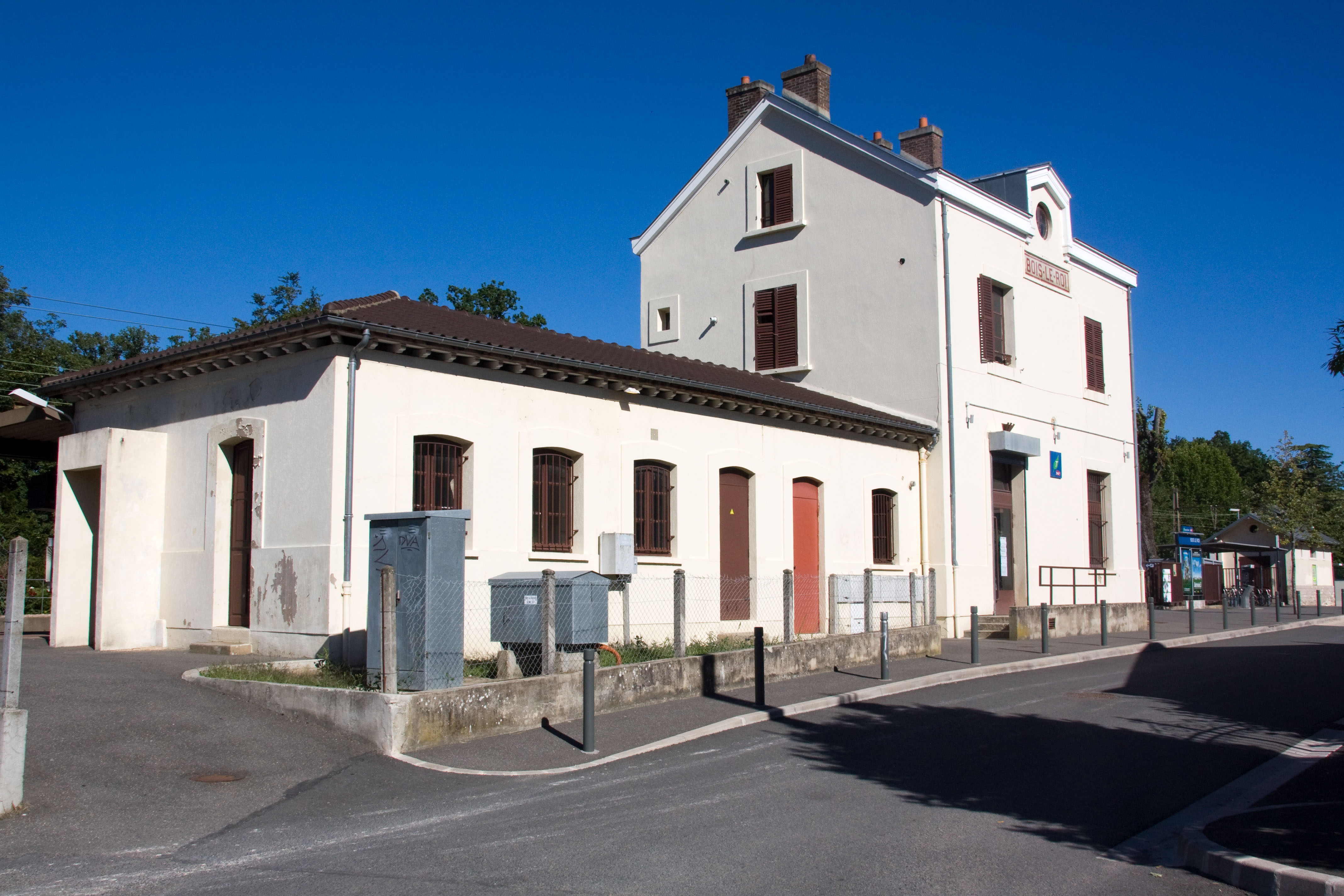 Gare de Bois-le-Roi, Bois-le-Roi, Seine-et-Marne, France